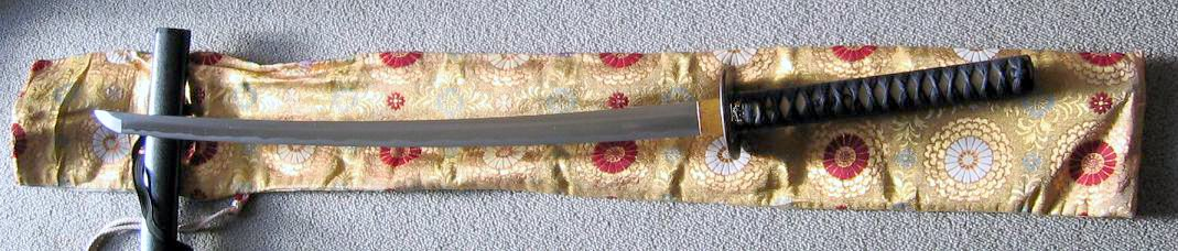 Katana, japonski meč.